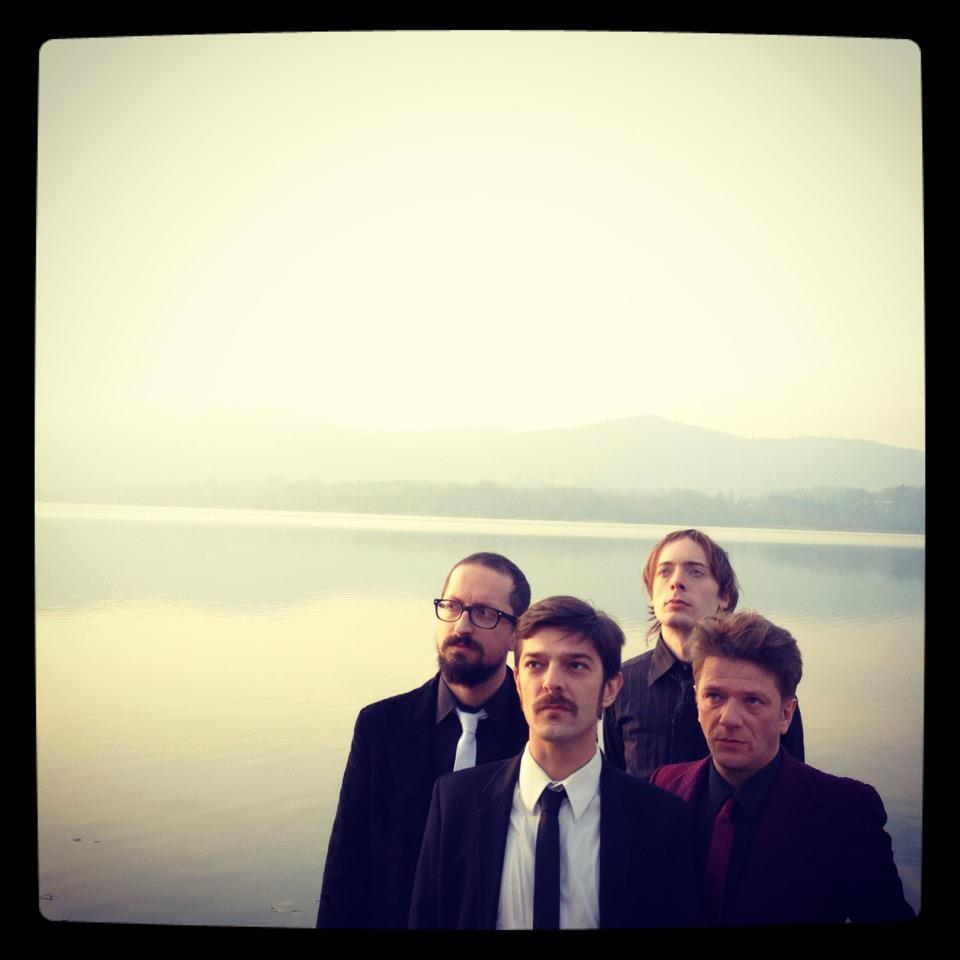 Il Teatro degli Orrori - Il mondo nuovo (2012 - La Tempesta/Universal)